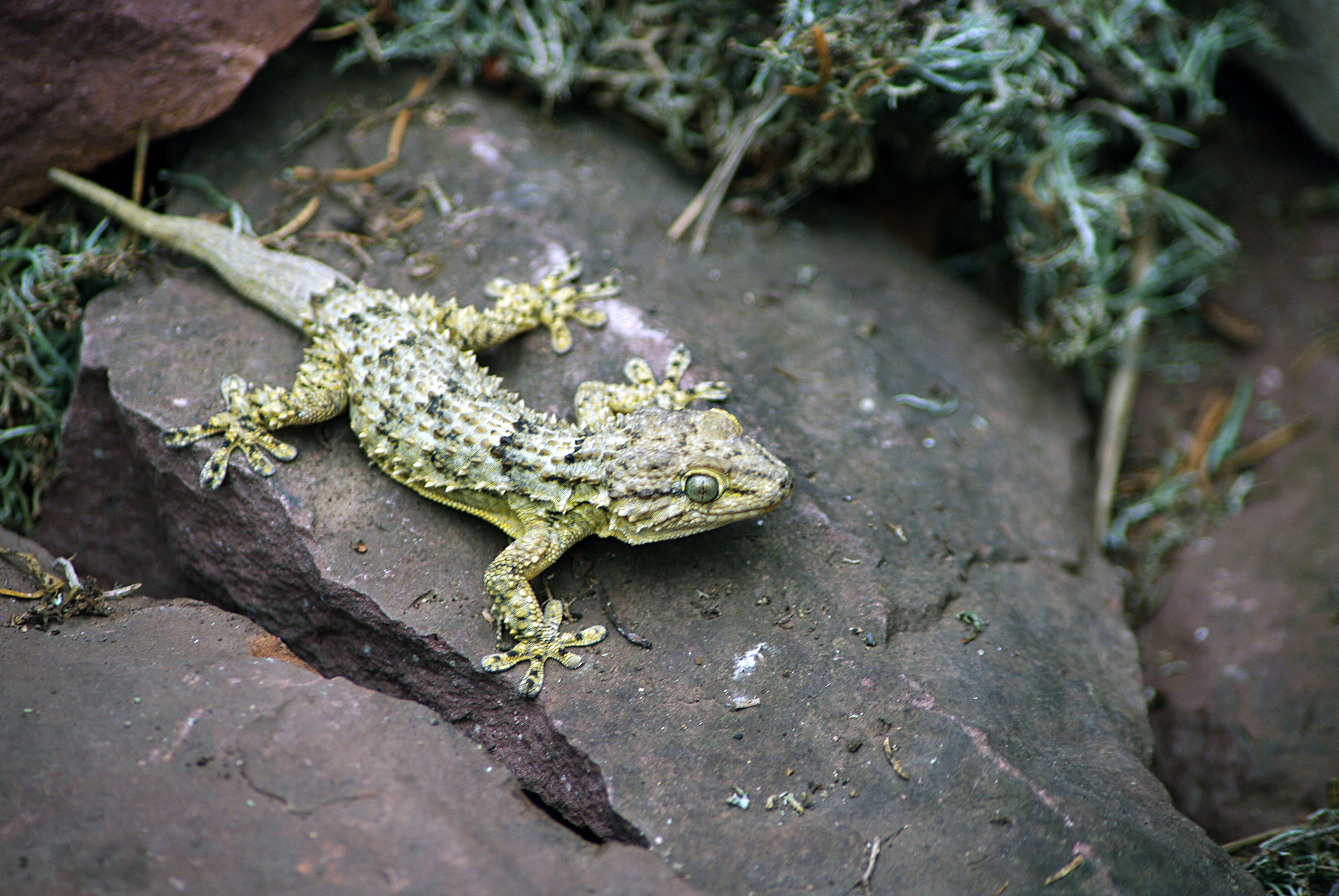 Adulter Mauergecko Griechenland, Pylos